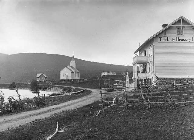 Oppheim kyrkje og The Lady Brassey Hotel på Oppheim på Voss